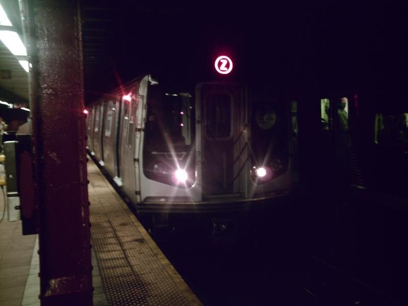 Tren Z del metro de NY